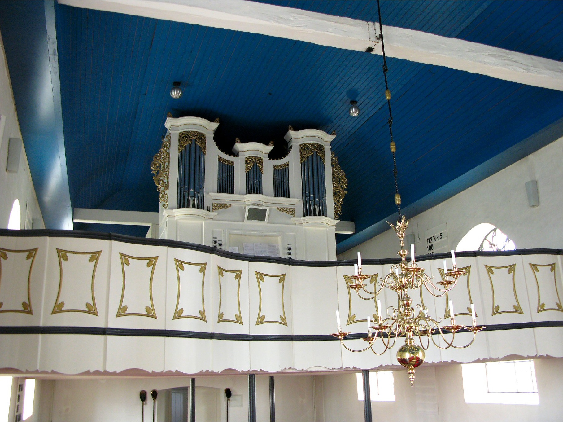 Orgel in Steenfelde, Landkreis Leer